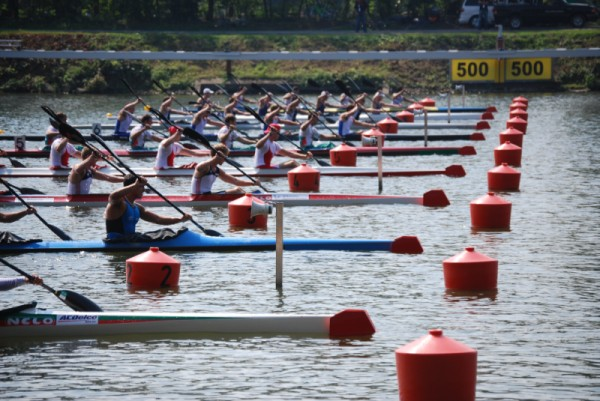 Die Kanus befinden sich in der Startposition und warten auf das Startsignal